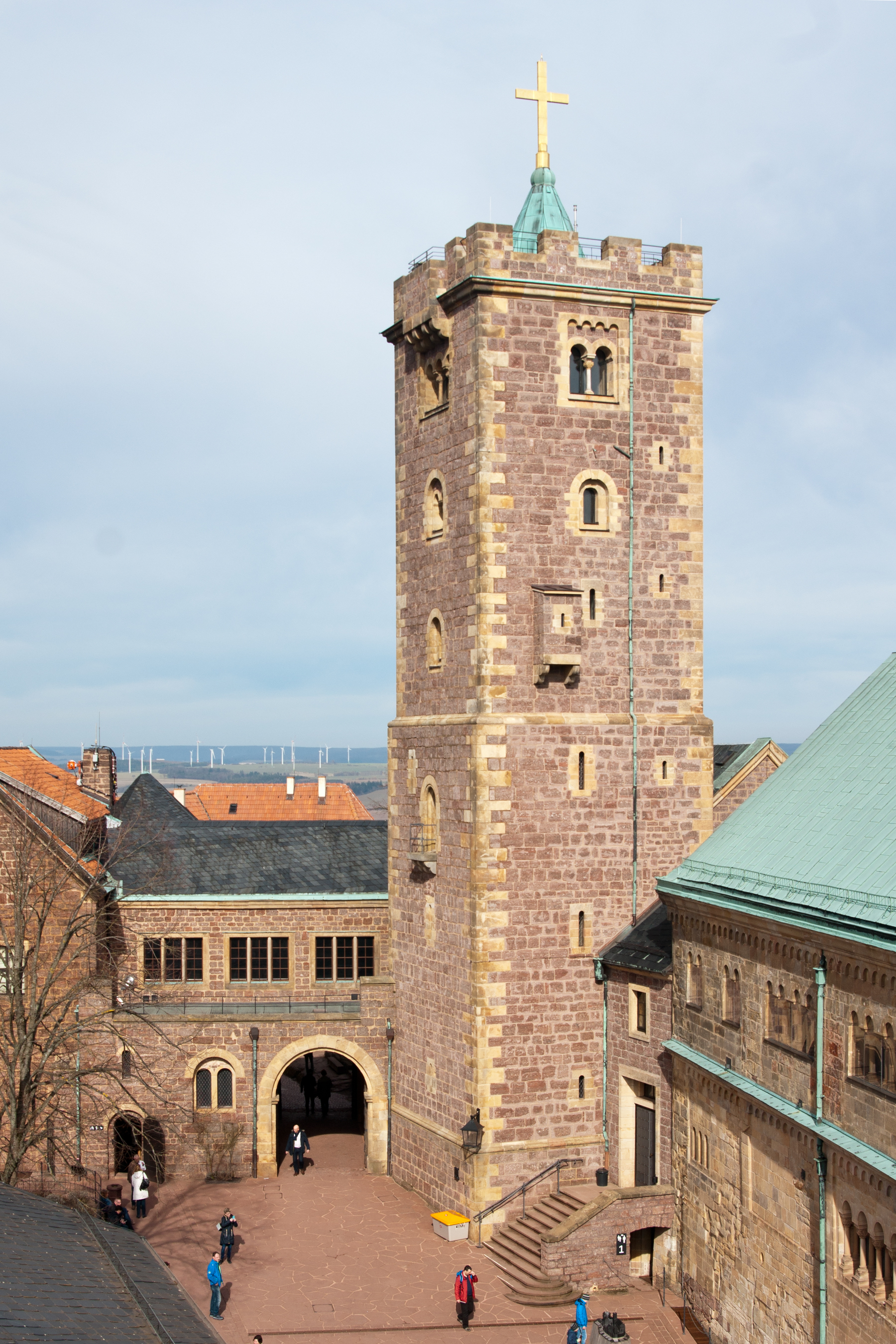 Der Bergfried der Wartburg bei Eisenach